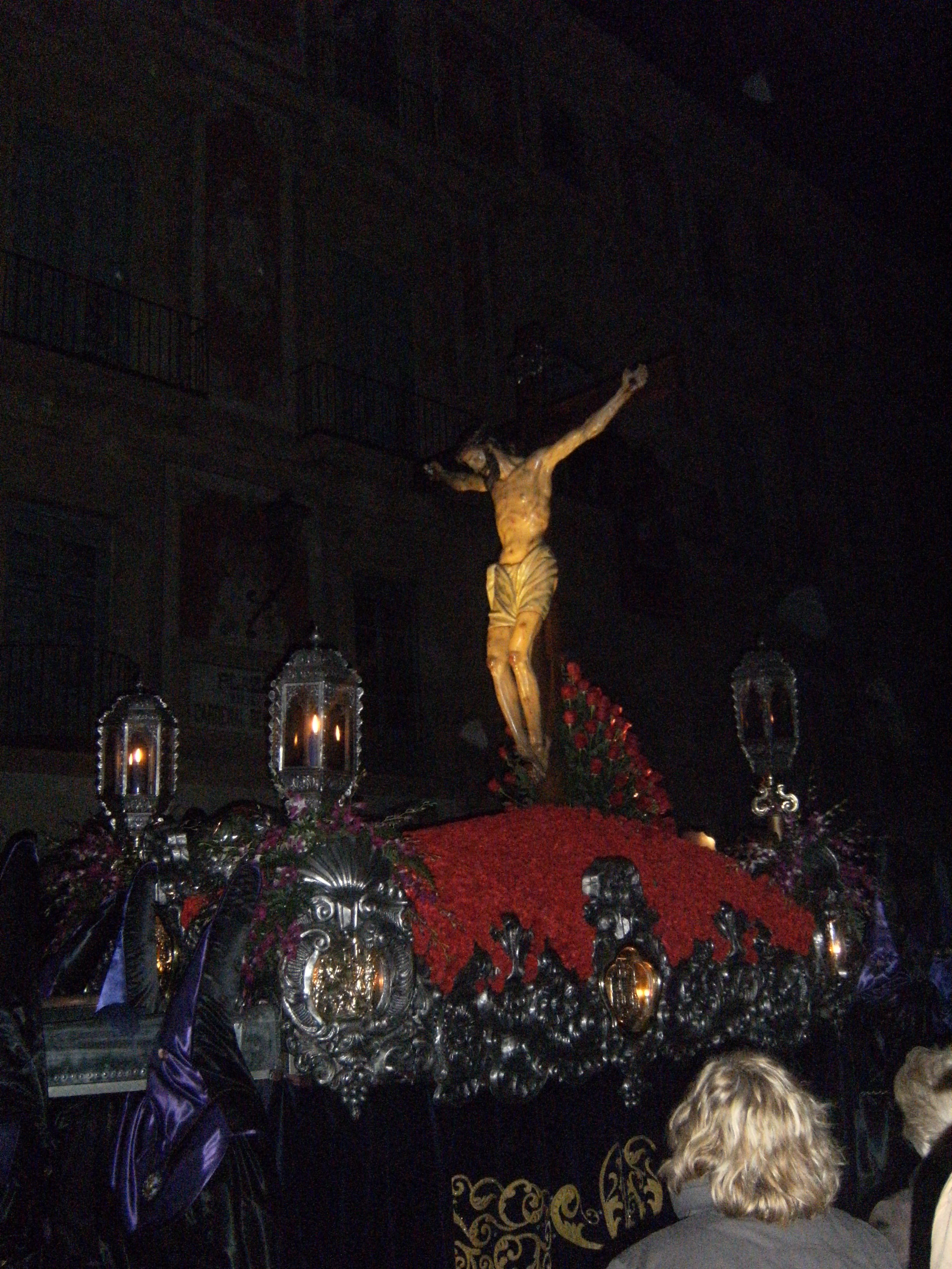 Paso del Cristo del Refugio de la procesión del Silencio de Murcia (Región de Murcia, España).